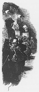 L'entrée de la salle de l'Éden-Concert décorée avec des magots chinois. Cette salle a disparu le 1er mai 1895.